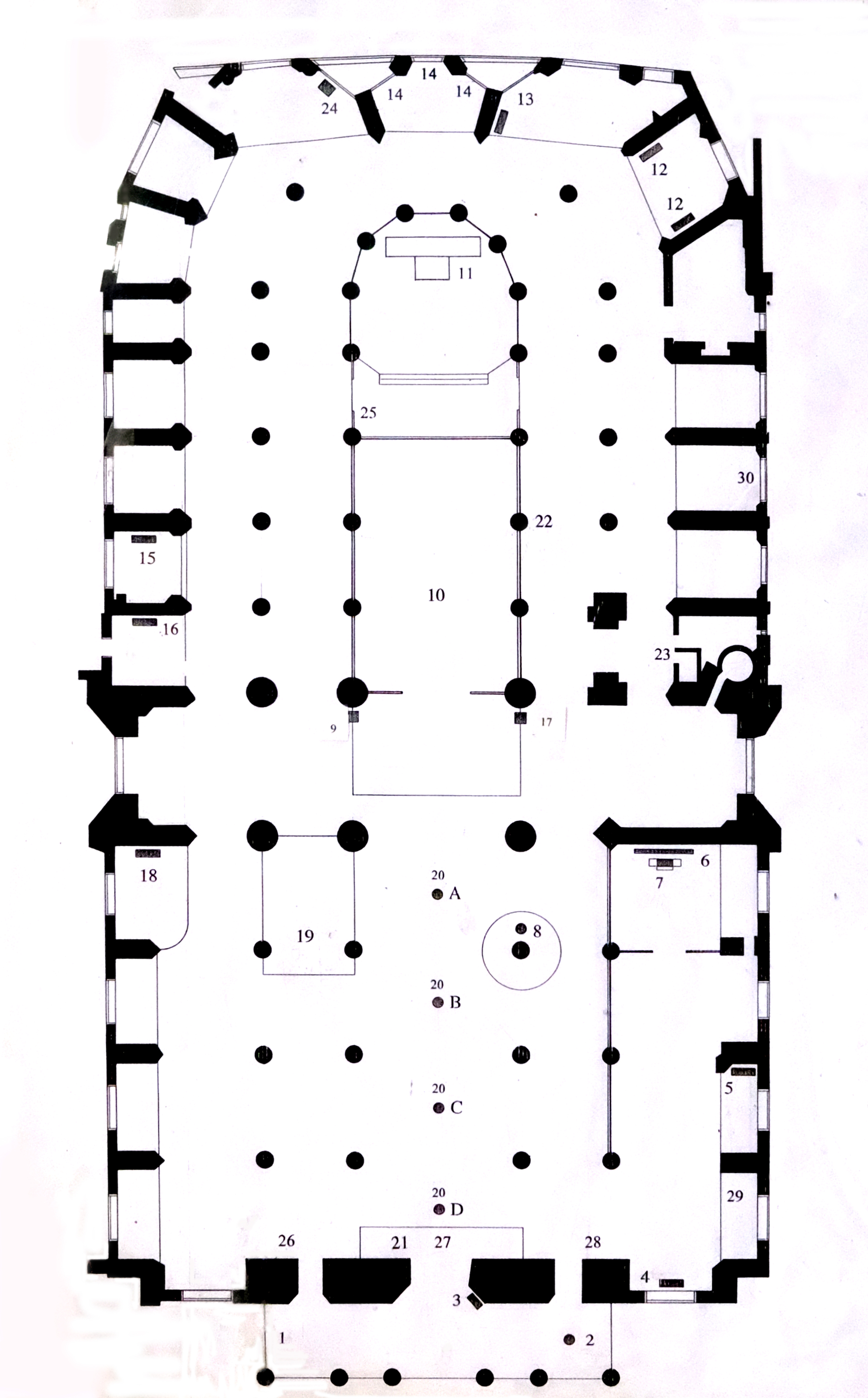 Eglise Saint-Germain-l'Auxerrois (plan, d'après celui exposé dans l'église) - Paris Ier